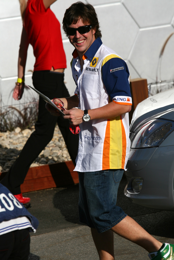 Fernando Alonso en el Gran Premio de Melbourne 2008